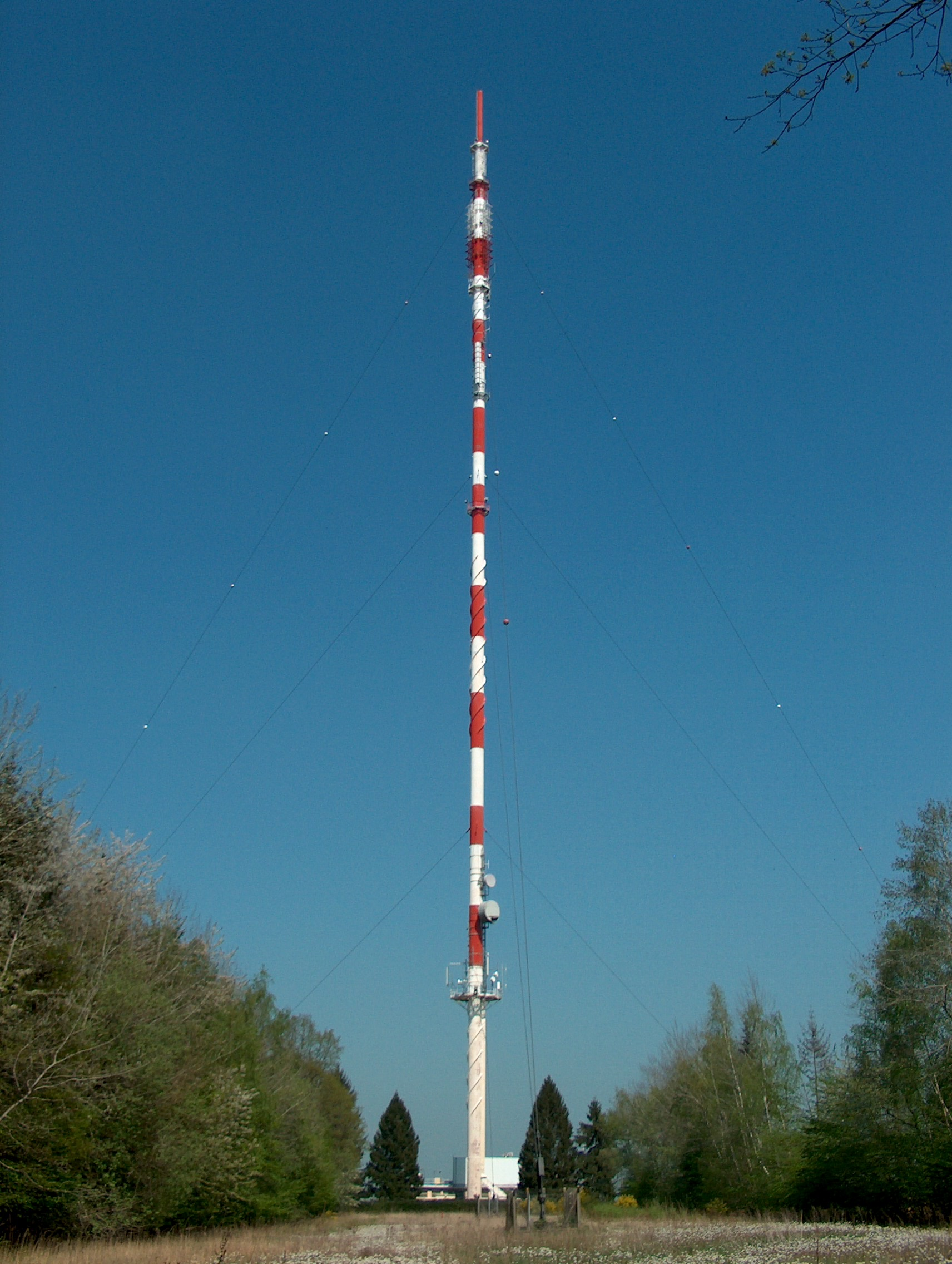 Emetteur de Sens - Gisy Les Nobles